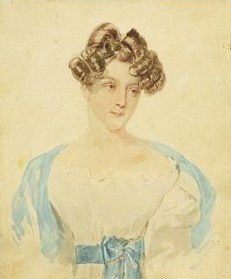 Наталья Львовна Соллогуб (1809-18..), одна из первых красавиц, замужем за дипломатом А.М.Обресковым(1790-1885), старшая сестра Надежды Львовны Соллогуб, в замуж. Свистунова.